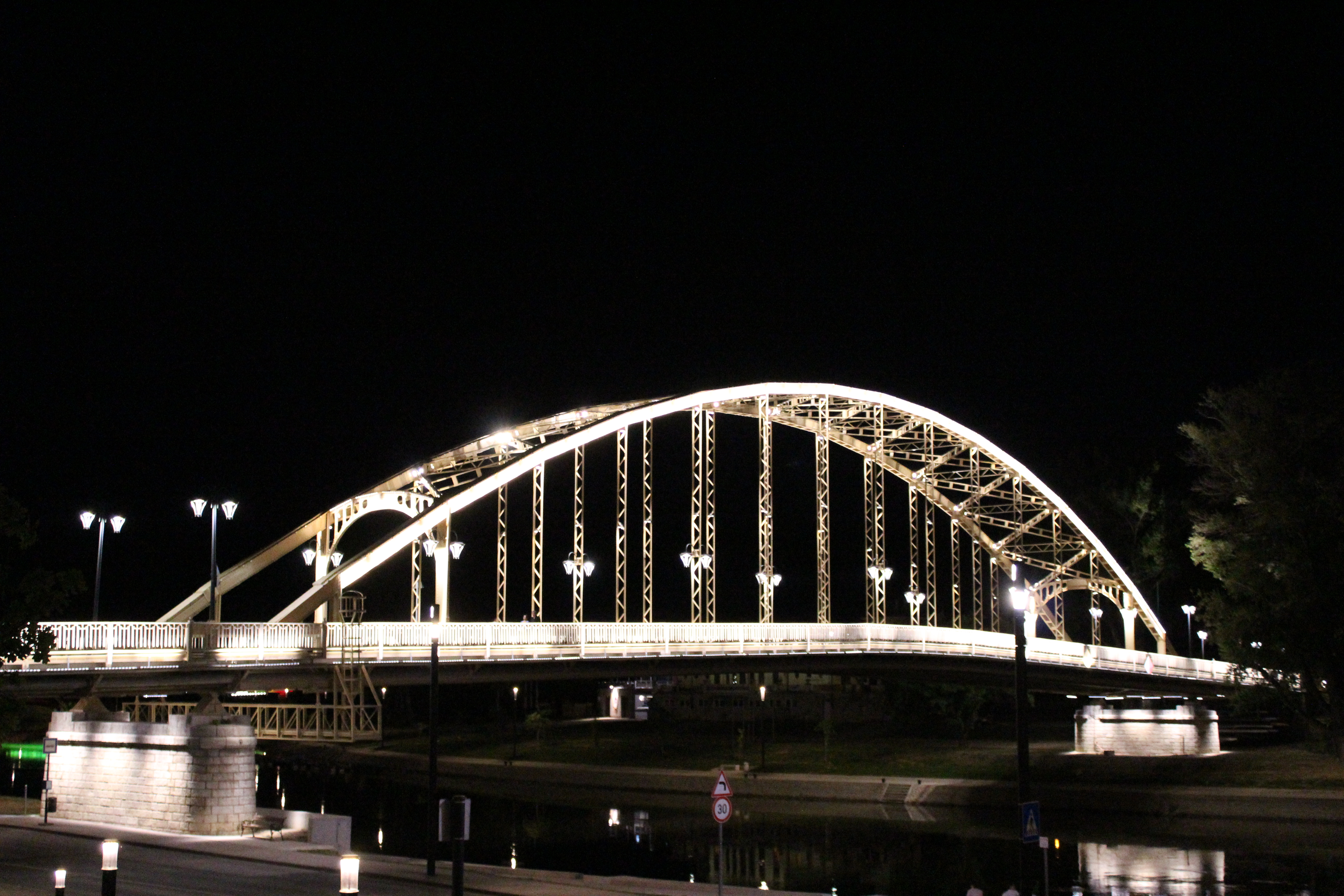 A győri Kossuth híd éjszakai díszvilágítása 2017 nyarán